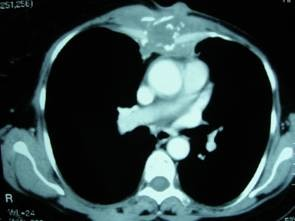 Istiocitoma fibroso maligno dello sterno rilevato mediante TC in una paziente sottoposta a radioterapia 19 anni prima per un'eteroplasia mammaria. Si rileva una lesione osteolitica aggressiva che distrugge la corticale ossea ed infiltra i tessuti circostanti. Tratto da Kocer et al. 2008 A case of radiation-induced sternal malignant fibrous histiocytoma treated with neoadjuvant chemotherapy and surgical resection. World Journal of Surgical Oncology CC-BY 2.0 License